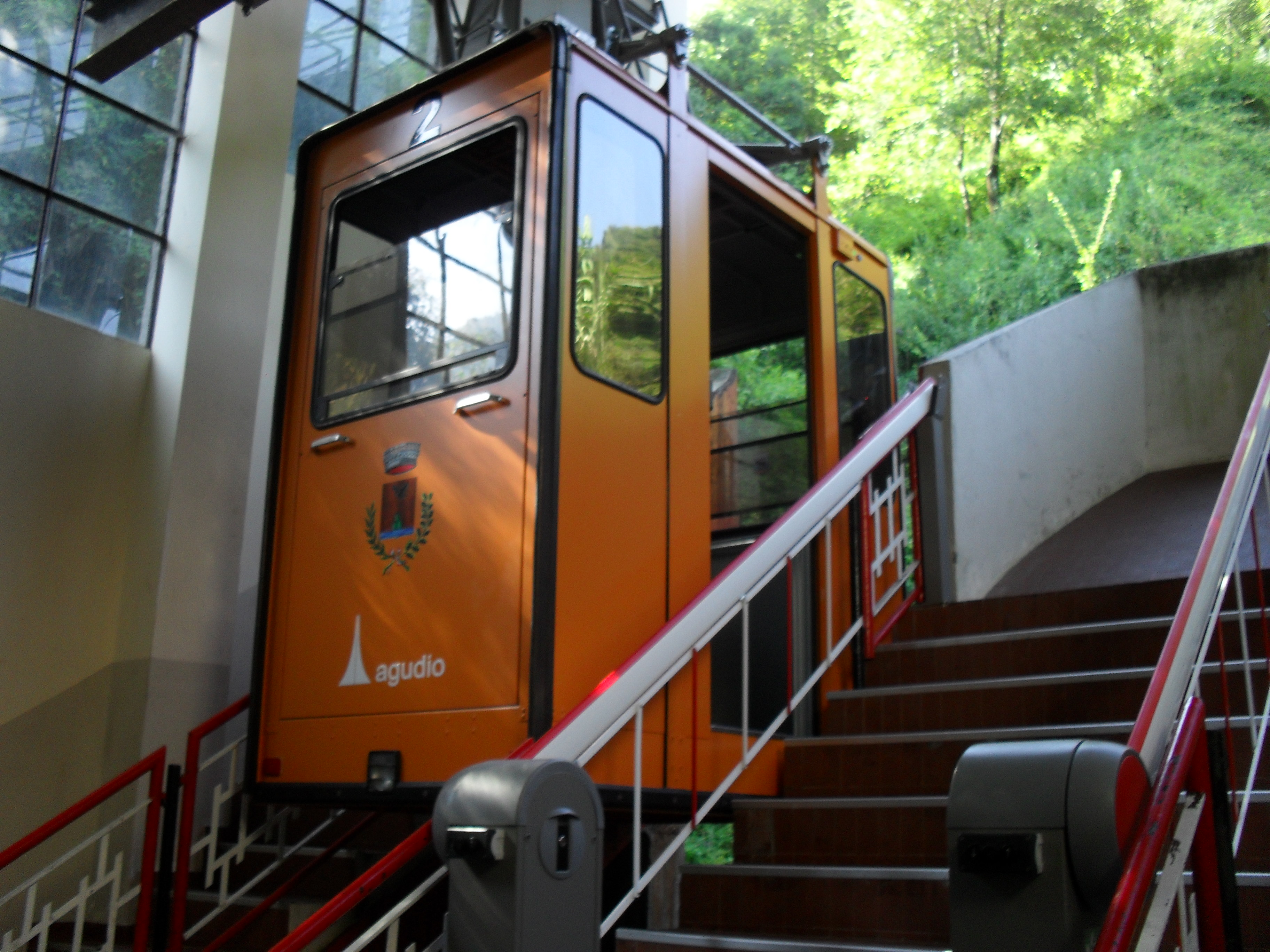 Cabina della funivia Argegno-Pigra